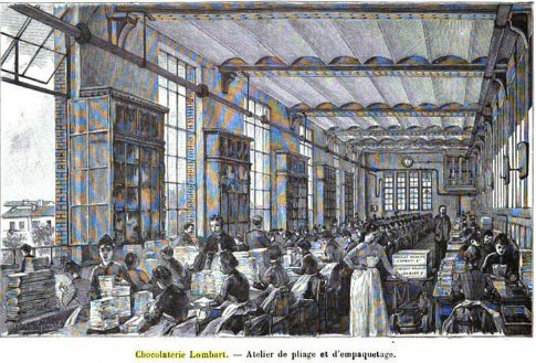 Chocolatiere Lombart - Atalier de pliage et d'empaquetage